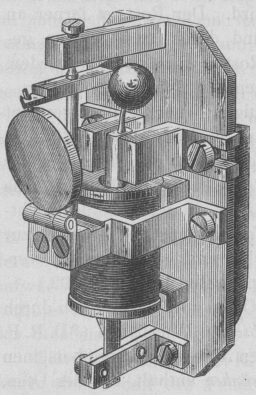 Fallklappe nach Herz